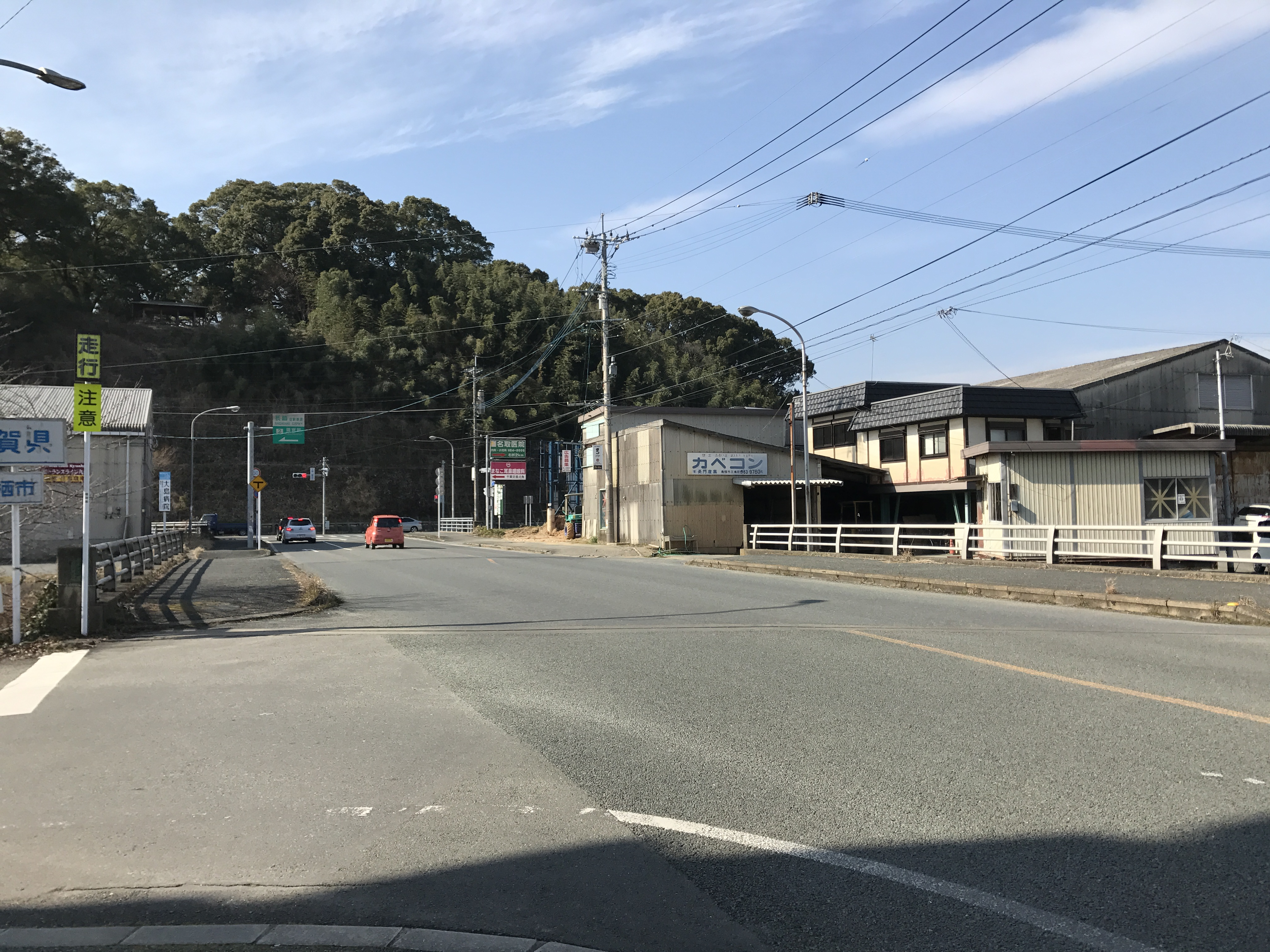 上千栗橋南側より望む佐賀県道・福岡県道145号